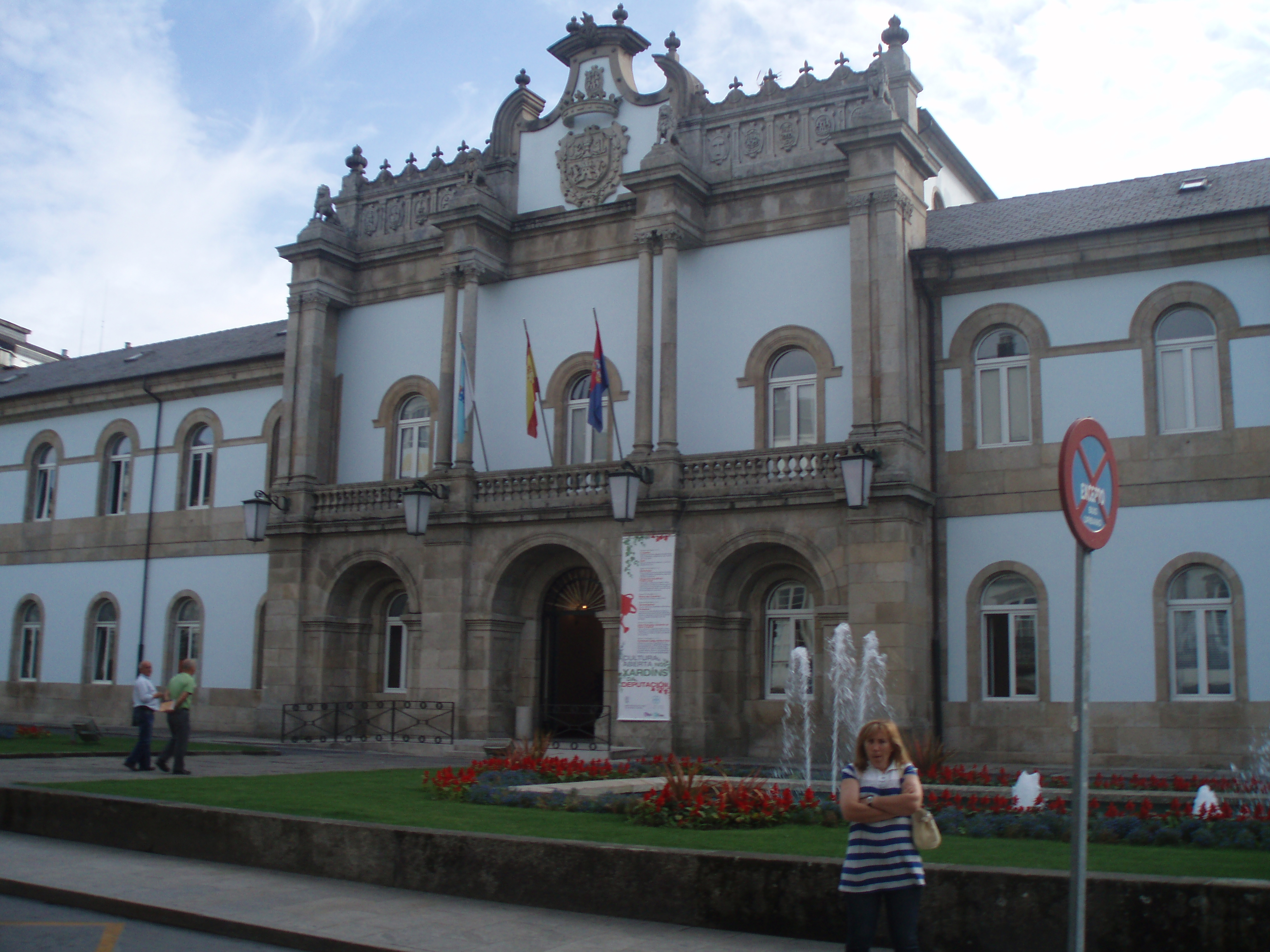 Cuerpo central del edificio de la Diputación Provincial de Lugo. (España).